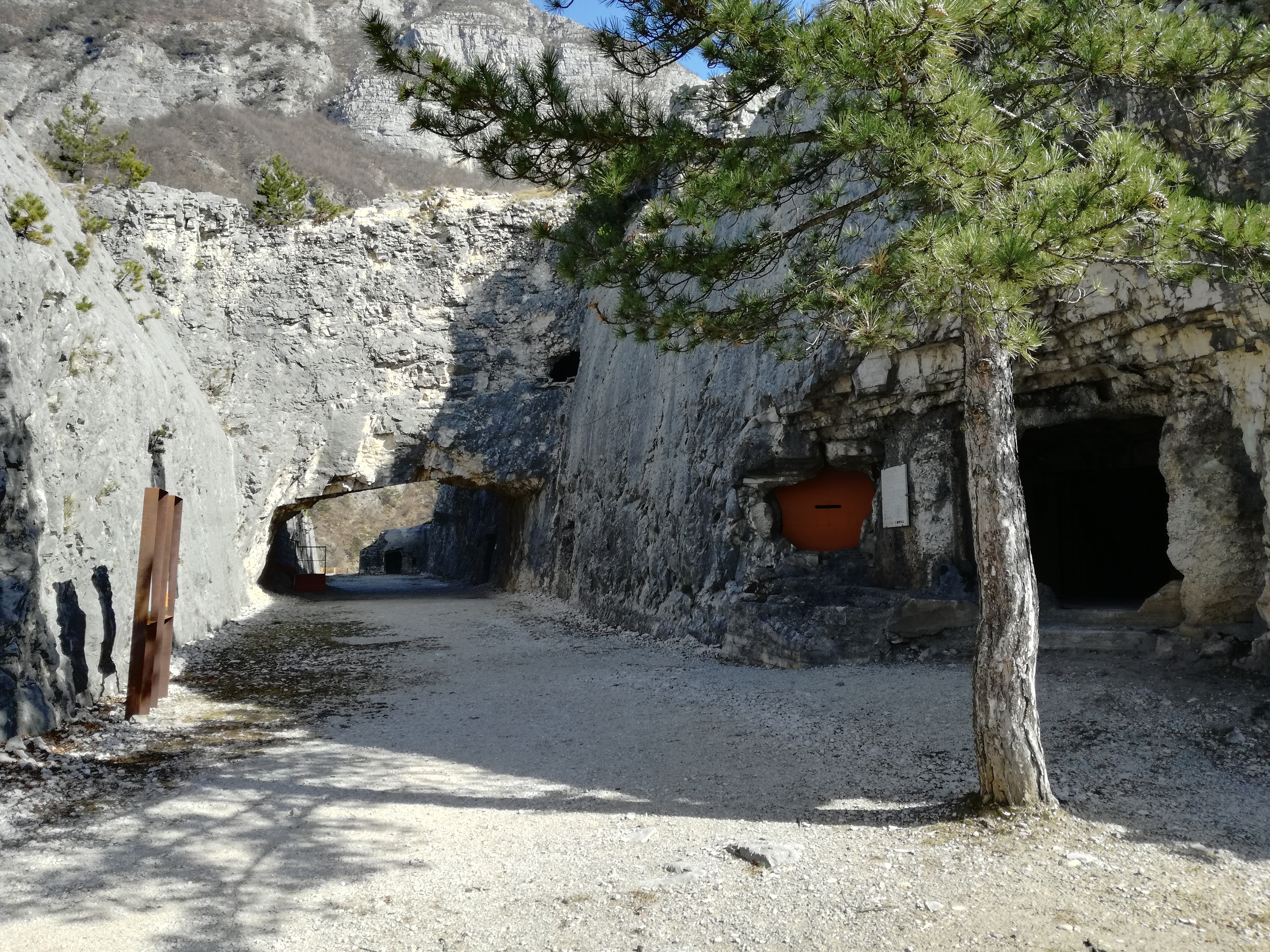 Kehlgraben und sog. Brücke im Werk Valmorbia